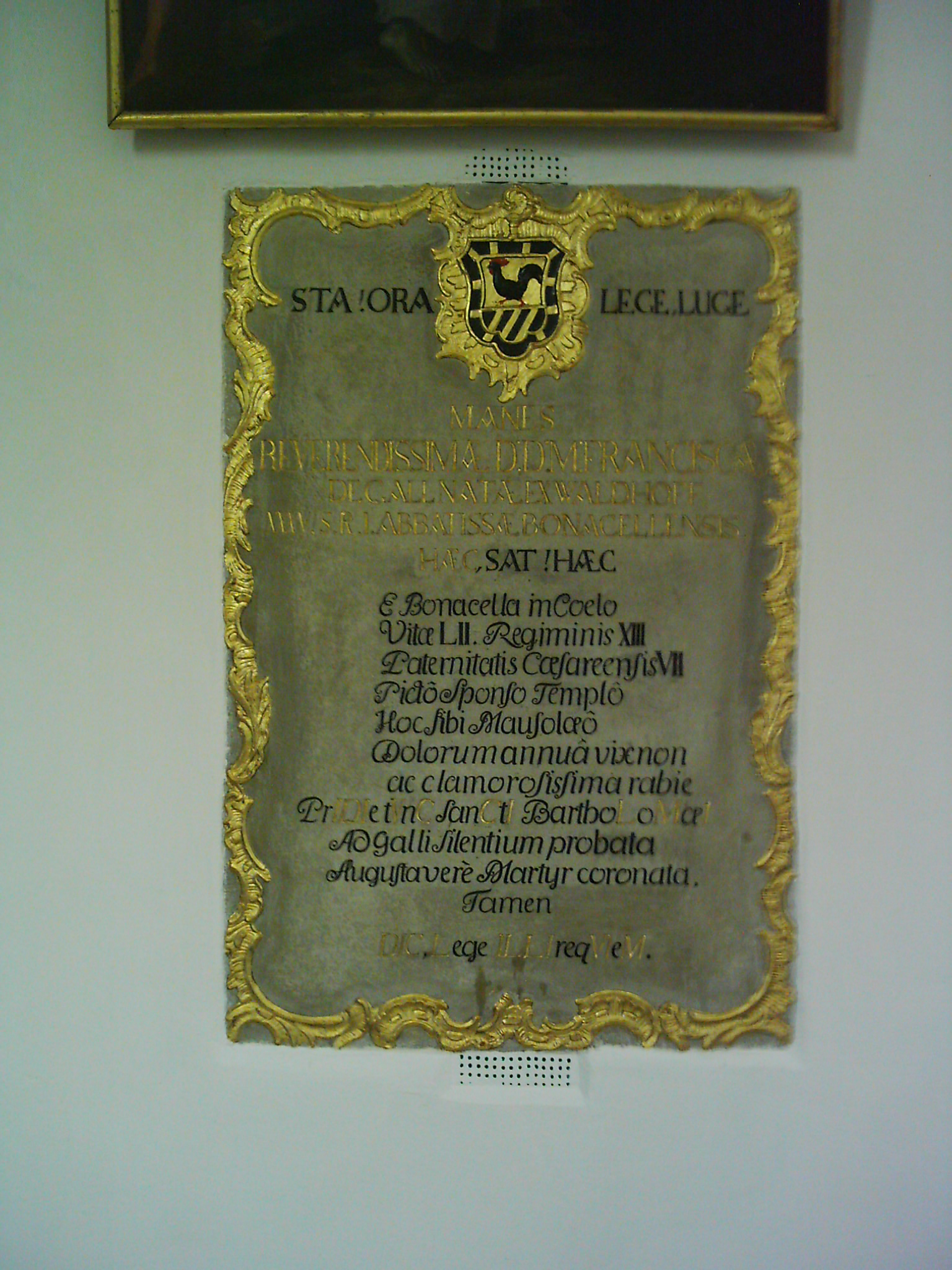 Römisch-Katholische Kirche St. Kosmas und Damian. 1755/76. Ehemalige Zisterzienserinnen-Reichsabtei. Epitaph für Äbtissin Maria Franziska von Gall († 1759}.